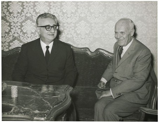 Presentazione alla Camera del II Governo Leone; il presidente del consiglio incaricato viene ricevuto da Pertini